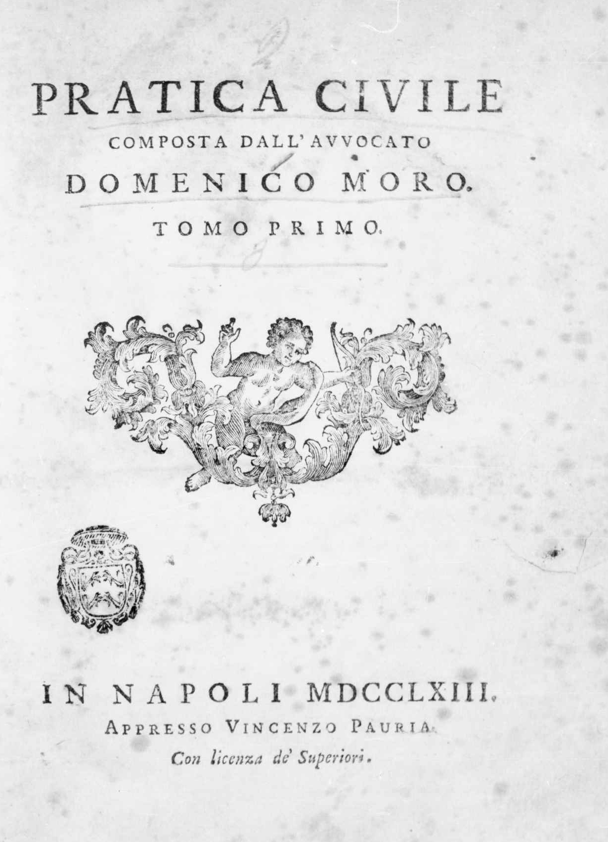 Frontespizio